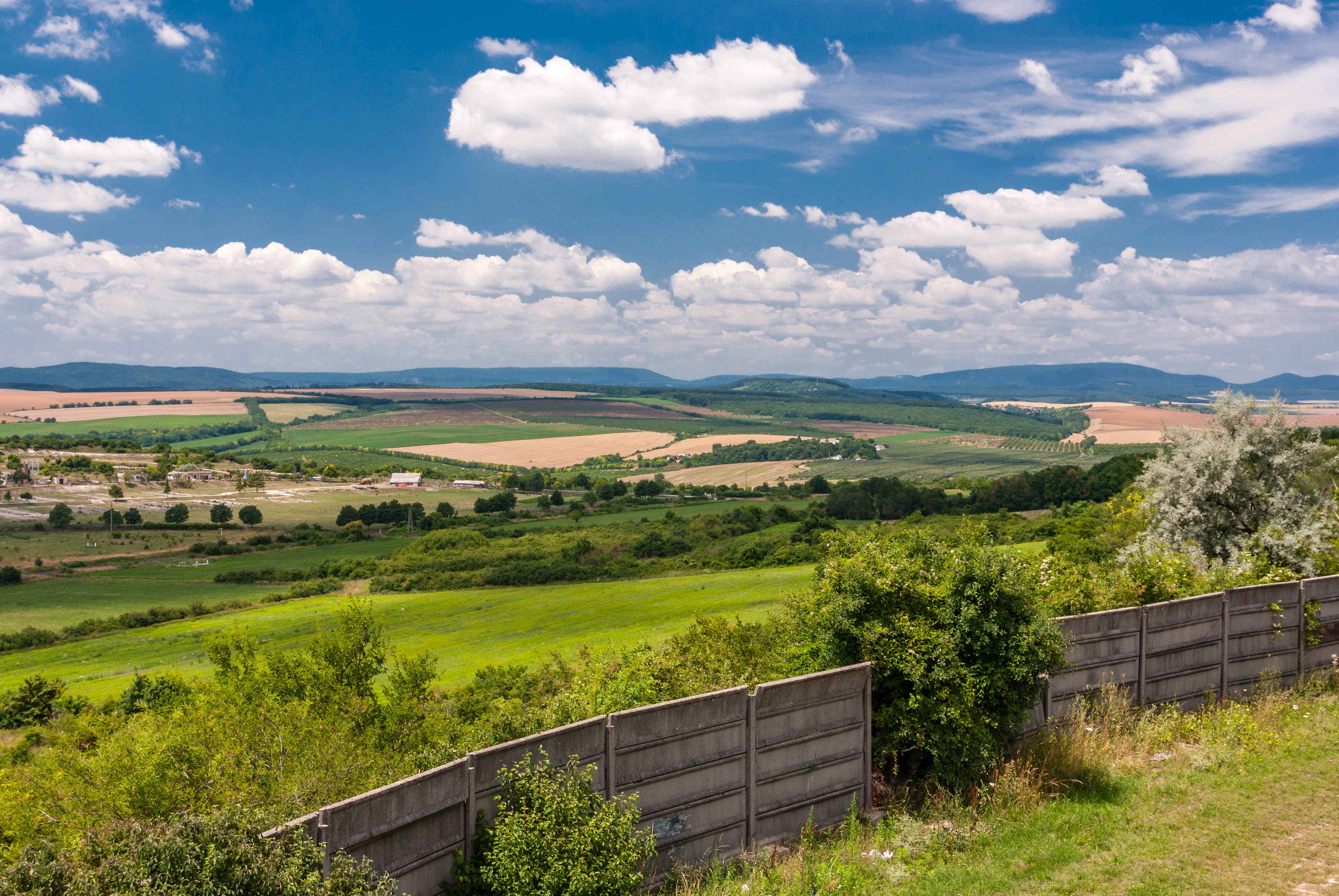 Kilátás a Zsámbéki Színházi és Művészeti Bázisról a nyugati oldalon lévő fedezéktől (a "Pulcinella-hangár" környékén) a hajdani rakétabázis betonkerítésével Szomor és a Gerecse vonulata irányában 2011 júliusában